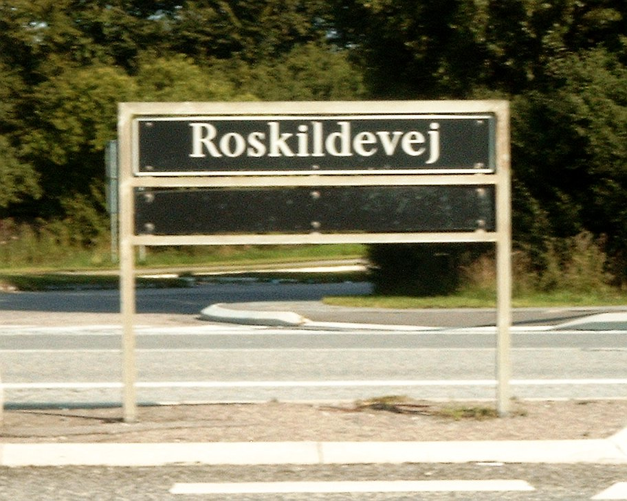 Road sign on Roskildevej in Høje Taastrup, Denmark. Photographer: Dan Simon